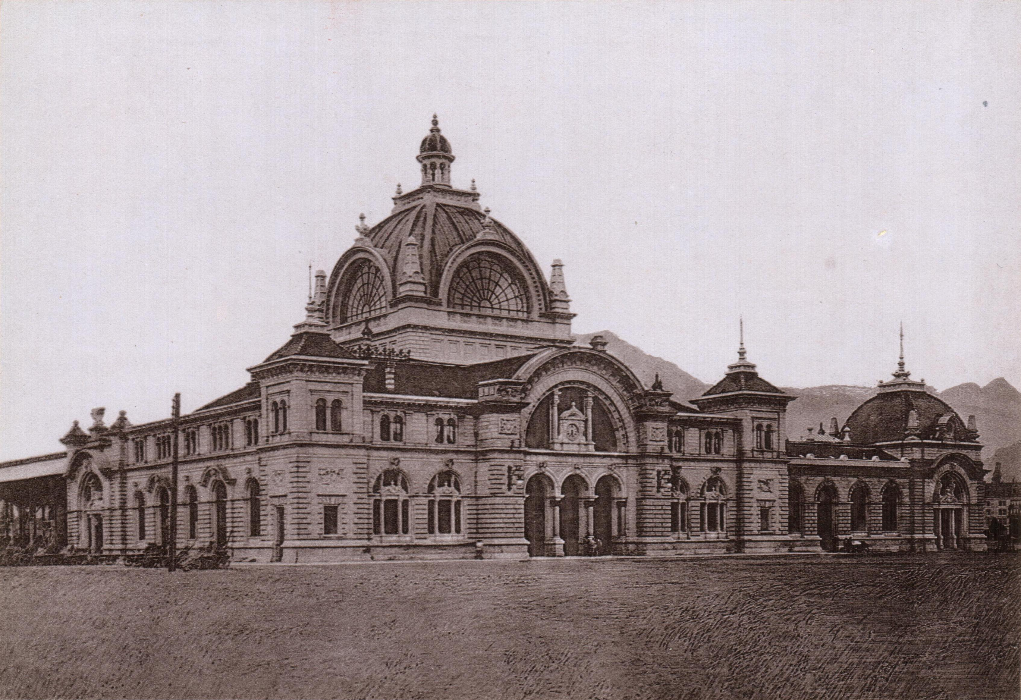 Osztrák-Magyar Monarchia, Luzern. Ernst Roepke fényképész, Wiesbaden. A Luzern című fényképalbum 12, fehér kartonsorozatra ragasztott, fehér vászonnal összefűzött fényképéből. ©© Megjelent Creative Commons alatt a Metapolisz sorozatban. A Metapolisz sorozat valamennyi képe és filmje Creative Commons alatti valamint kereskedelmi - for profit - célra is felhasználható. Ajánlott hivatkozás: Derzsi Elekes Andor: Metapolisz DVD line ©© Published under Creative Commons in the Metapolisz DVD line. All of the photos and vids in the Metapolisz DVD line are under Creative Commons and can be used even for commercial – for profit – purposes. Recommended Citation Derzsi Elekes Andor: Metapolisz DVD line